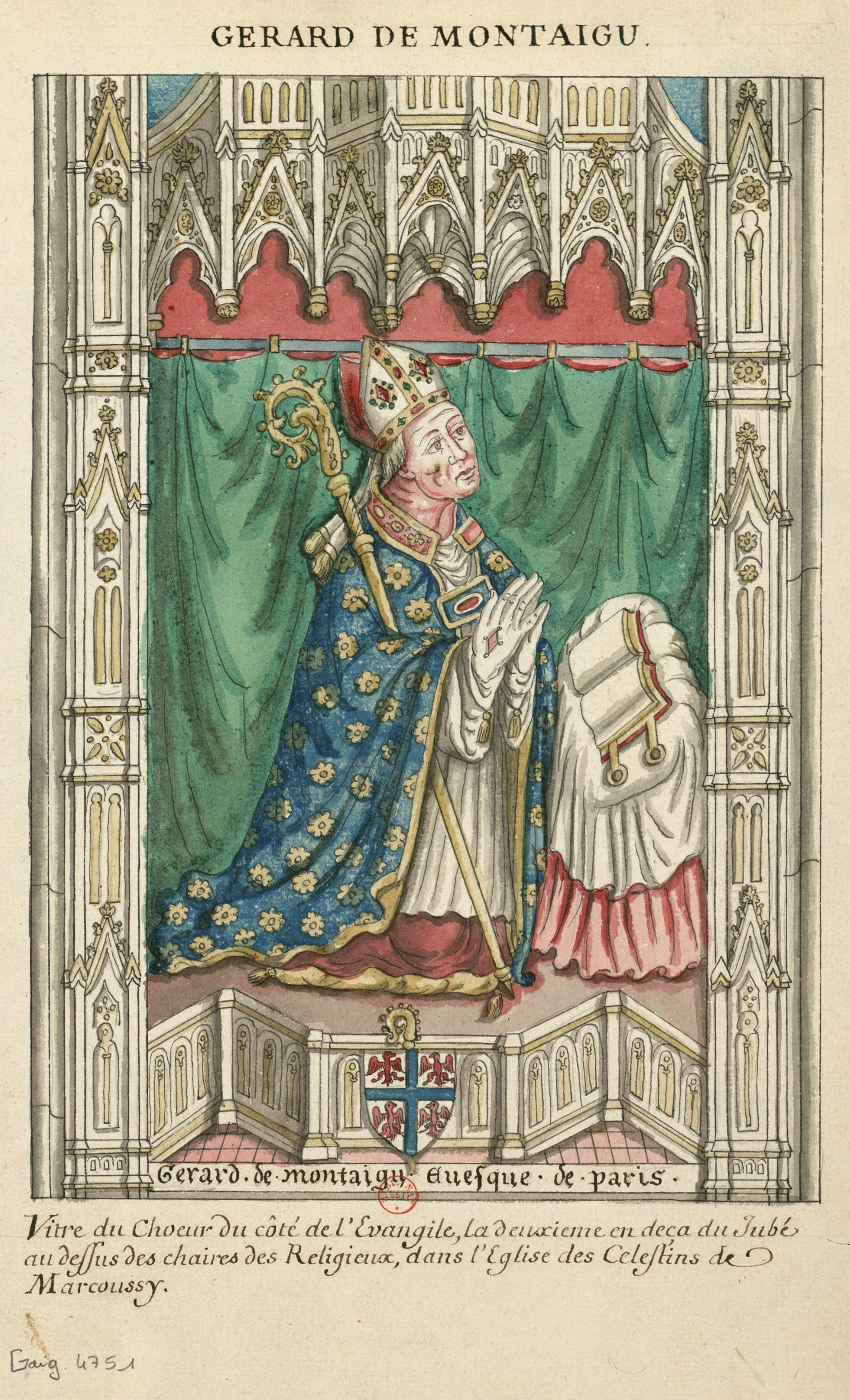 Aquarelle d'un vitrail de l'église du monastère des Célestins de Marcoussis représentant Gérard de Montaigu